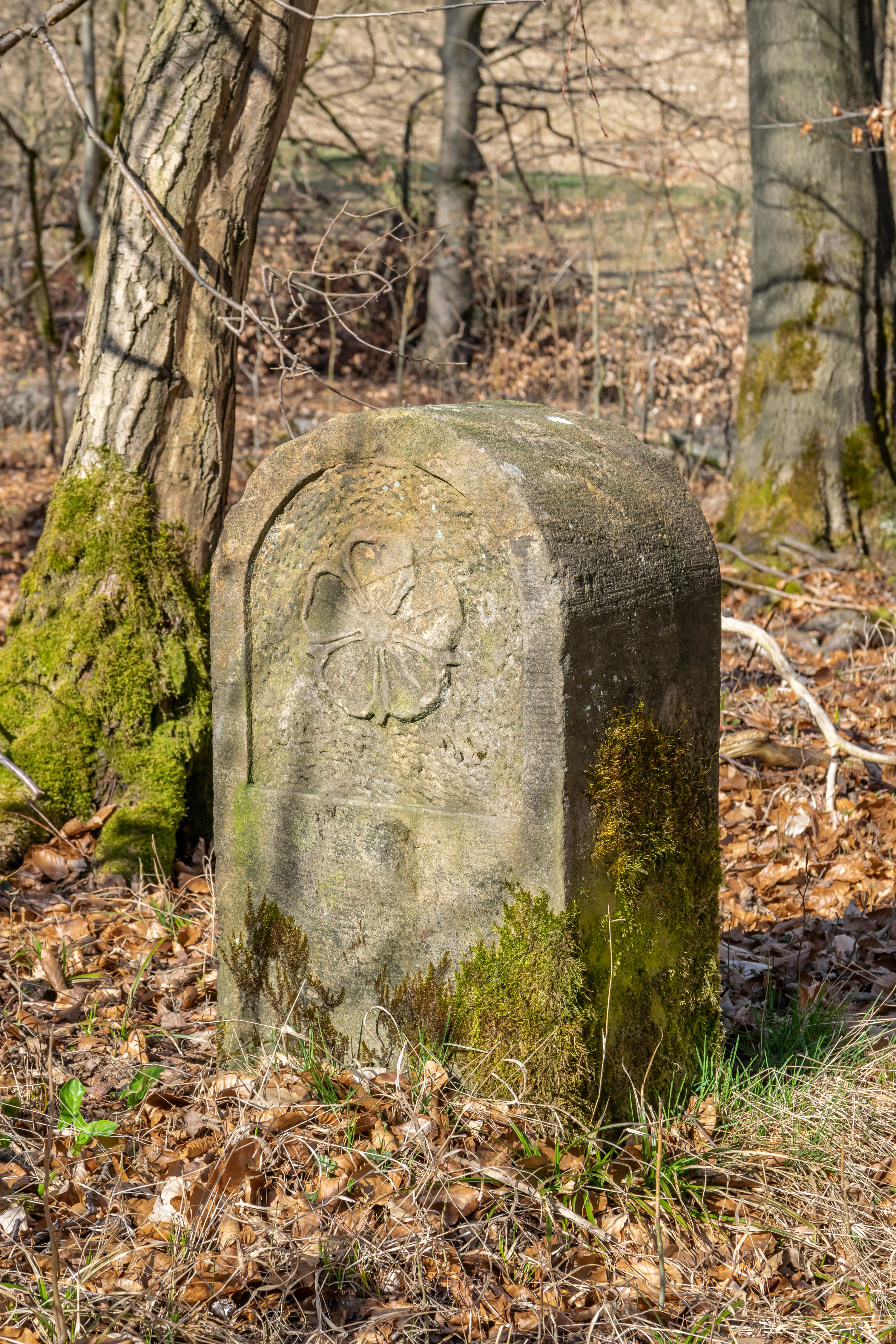 Historischer Grenzstein der ehemaligen Lippischen Exklave Grevenhagen (Serie 041) zum Königreich Preußen, Nr. 132, lippische Seite.